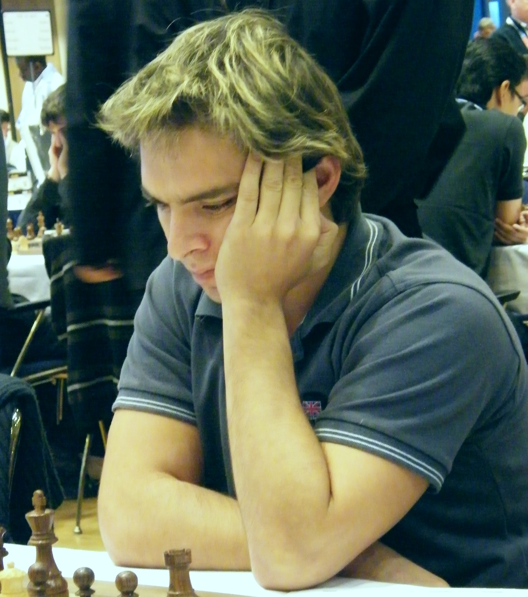 Lazaro Bruzon bei der 38. Schacholympiade in Dresden 2008